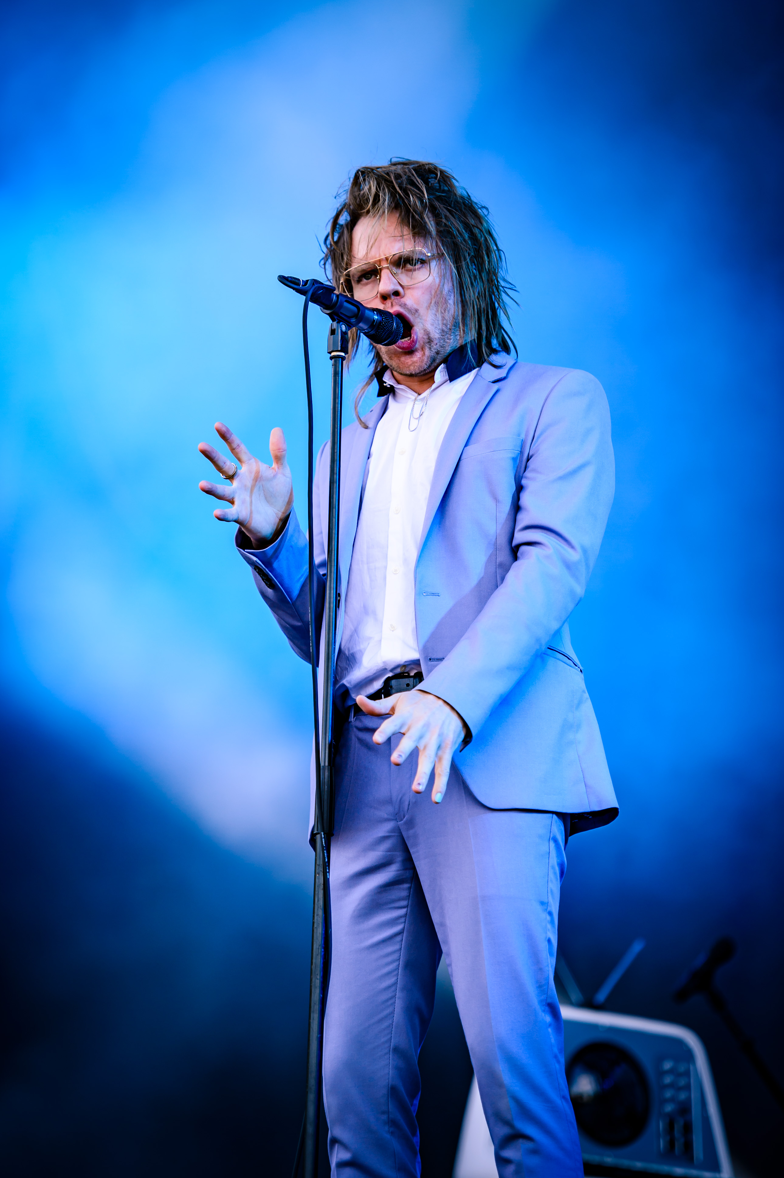 'Rock im Park 2018; Zeppelinfeld Nürnberg': 'Enter Shikari'